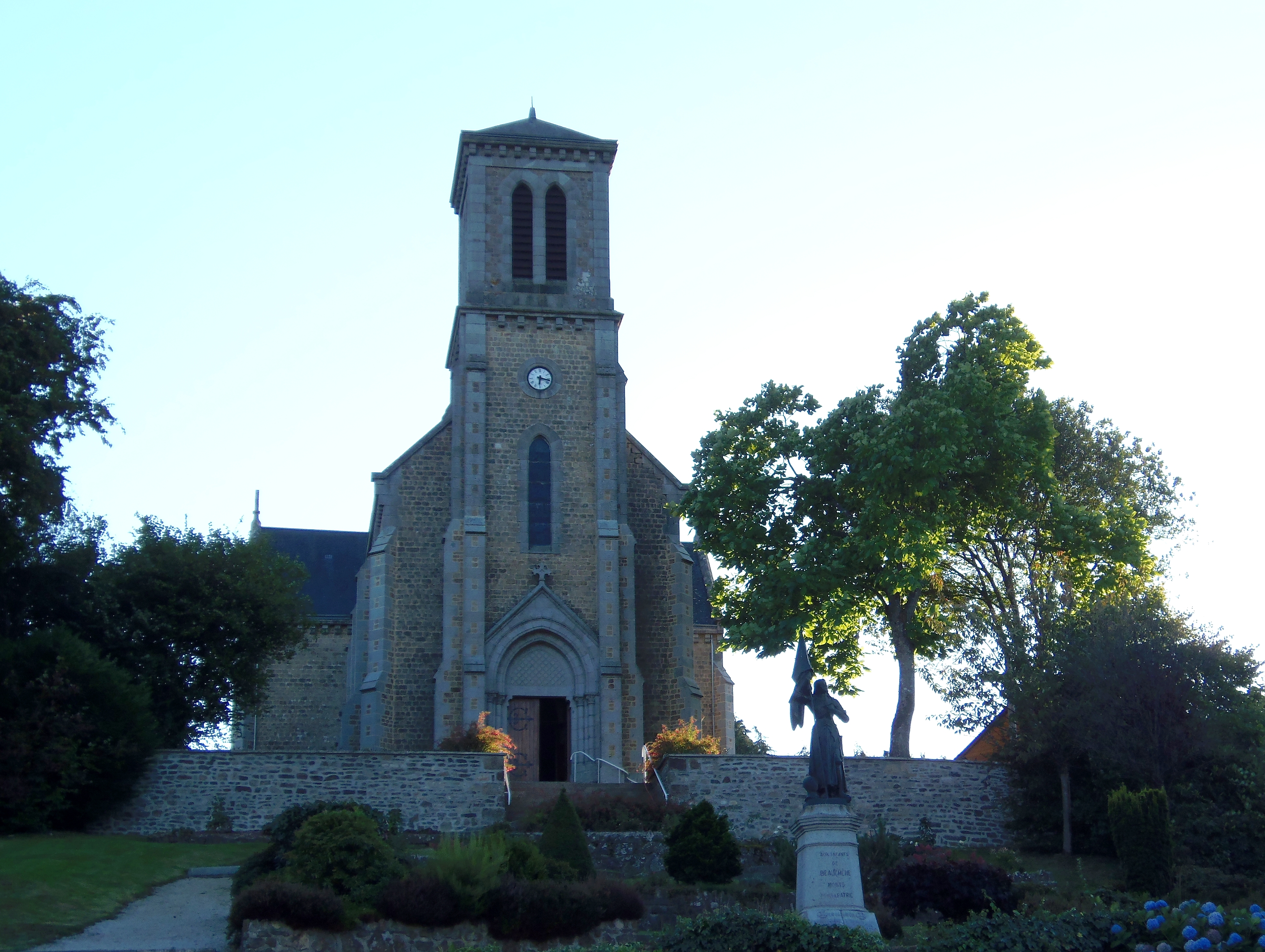 Beauchêne (Normandie, France). L'église Notre-Dame-de-la-Paix-Saint-Pierre-et-Saint-Paul.